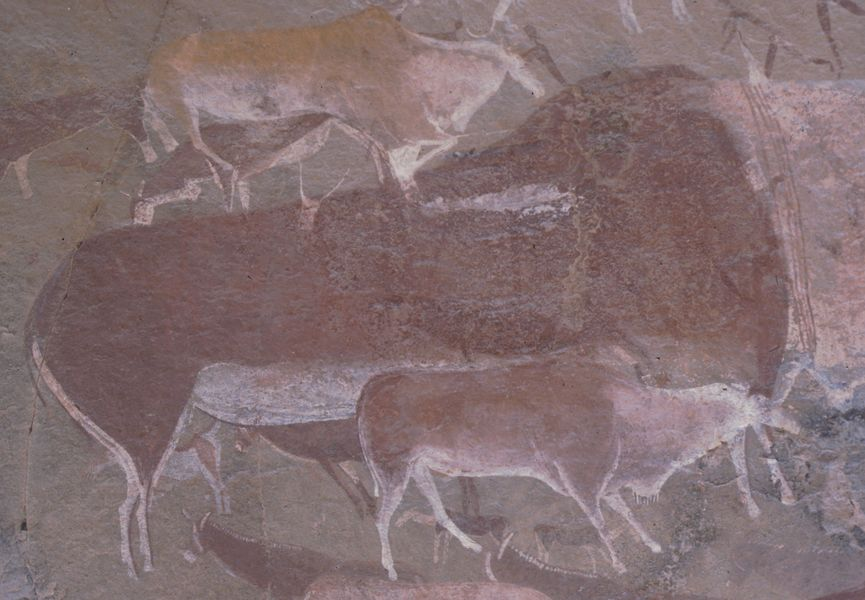 Pitture rupestri. Figure animali, eland.